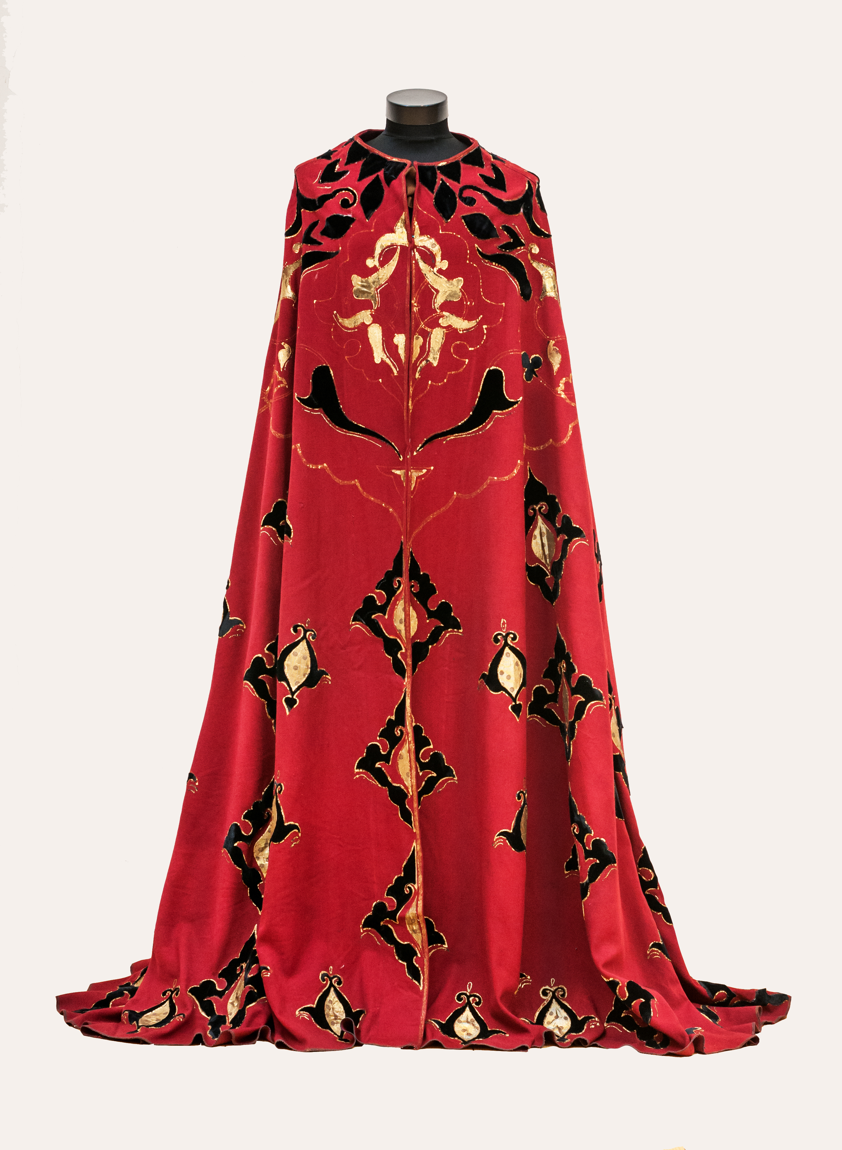 Original Pelerine of the Prince Cholokashvili from a movie Bashi-Achuki by Revaz Mirzashvili 1956